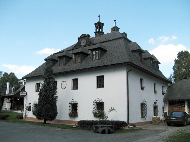 Zámek Broumov, pod vsí, nedaleko zaniklého mlýna 30, Broumov